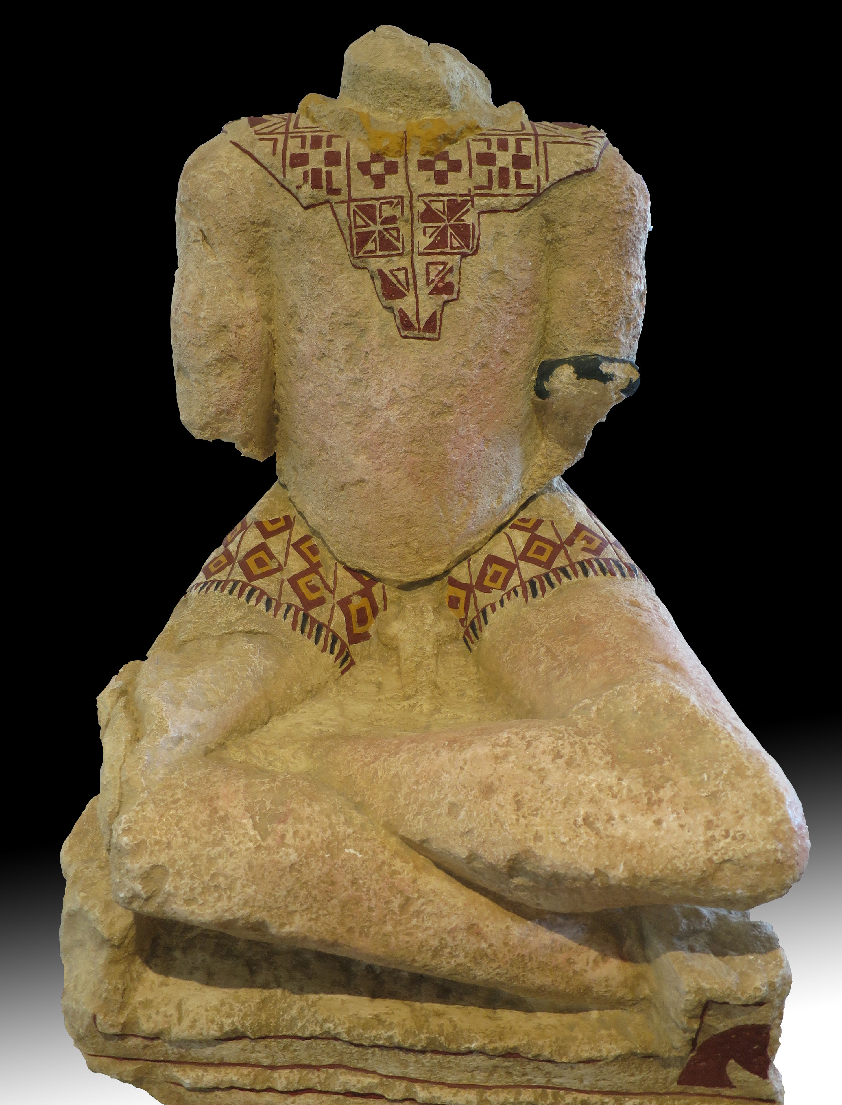 Replik der Figur eines sitzenden Kelten mit rekonstruierter Bemalung. Besucherzentrum in Glanum.